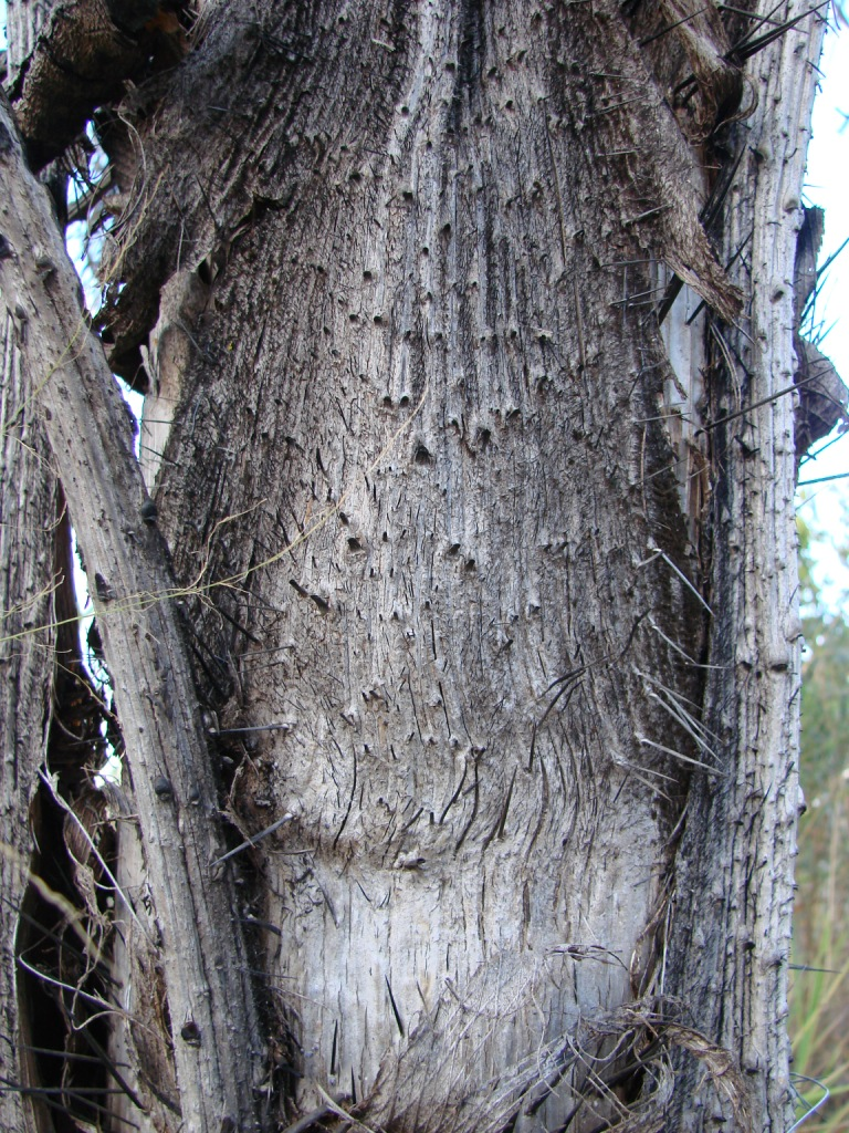 Acrocomia aculeata - ARECACEAE Parque Olhos D'Água - Brasília - Distrito Federal - Brasil.